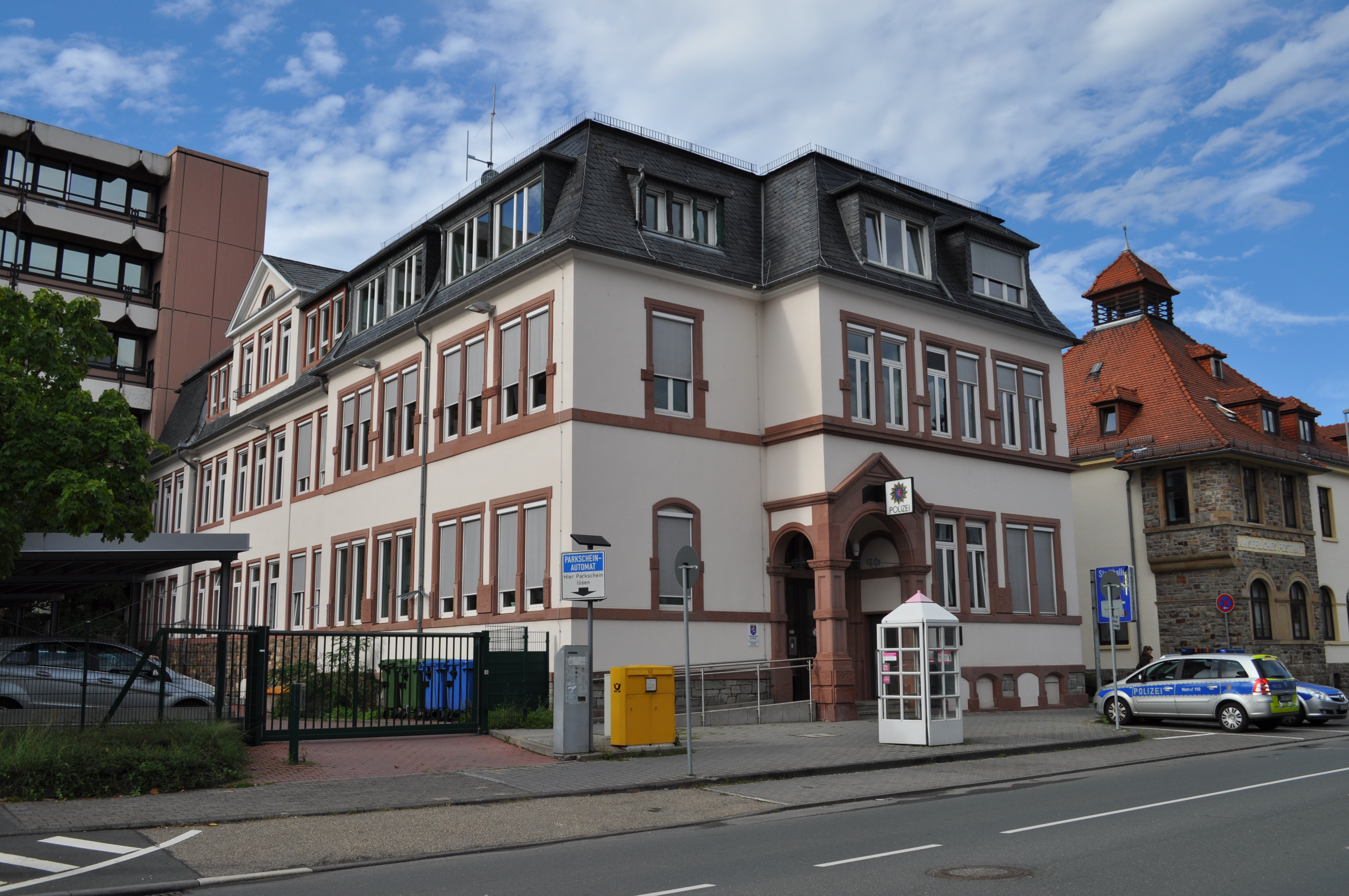 Ekkehard Gries-Haus in Oberursel, Das Gebäude war 1903 bis 1931 höherer Mädchenschule, 1932 bis 2002 Rathaus und wird seitdem als Polizeistation genutzt. Es ist nach dem hessischen Minister Ekkehard Gries (FDP) benannt.